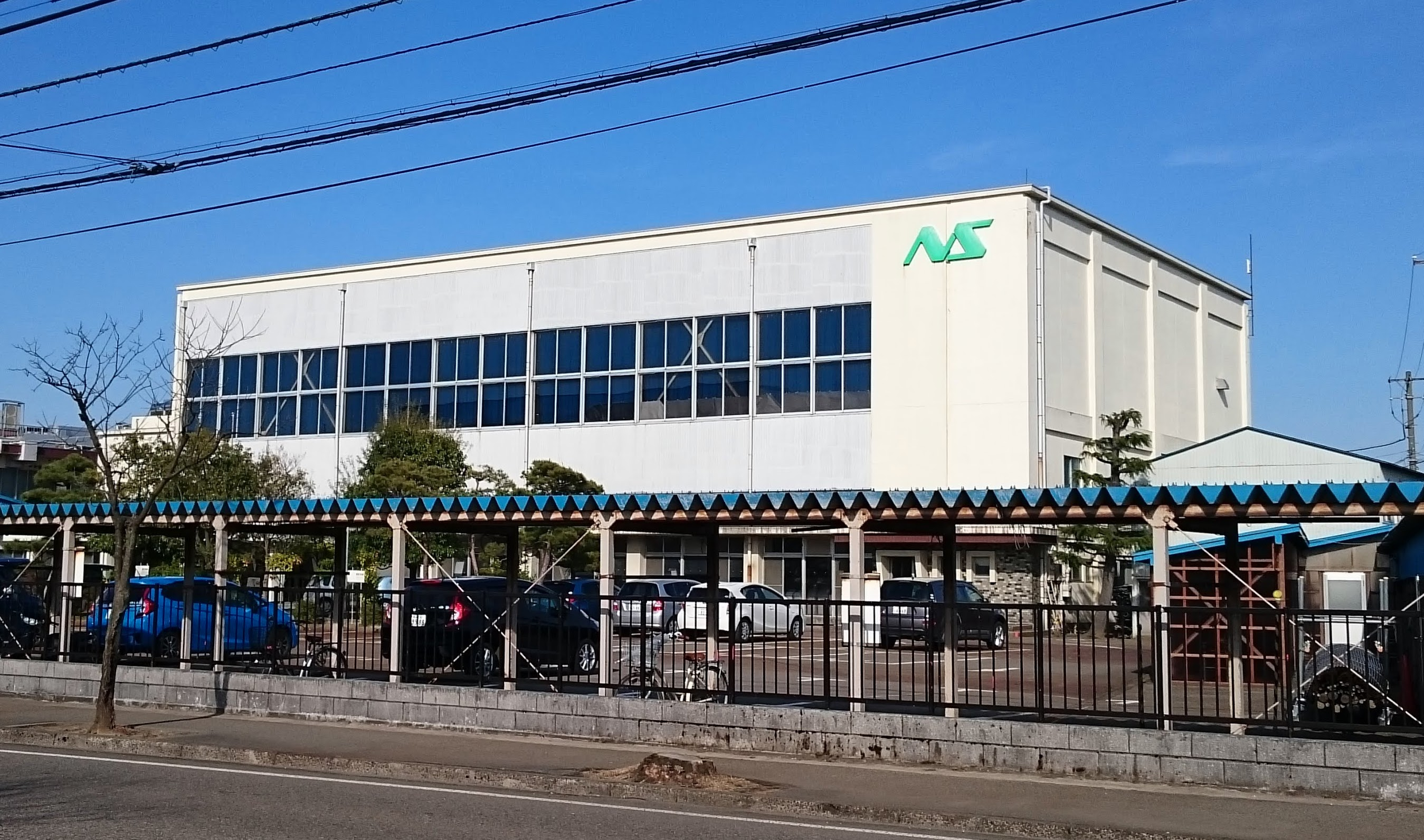 日本精機株式会社の本社外観